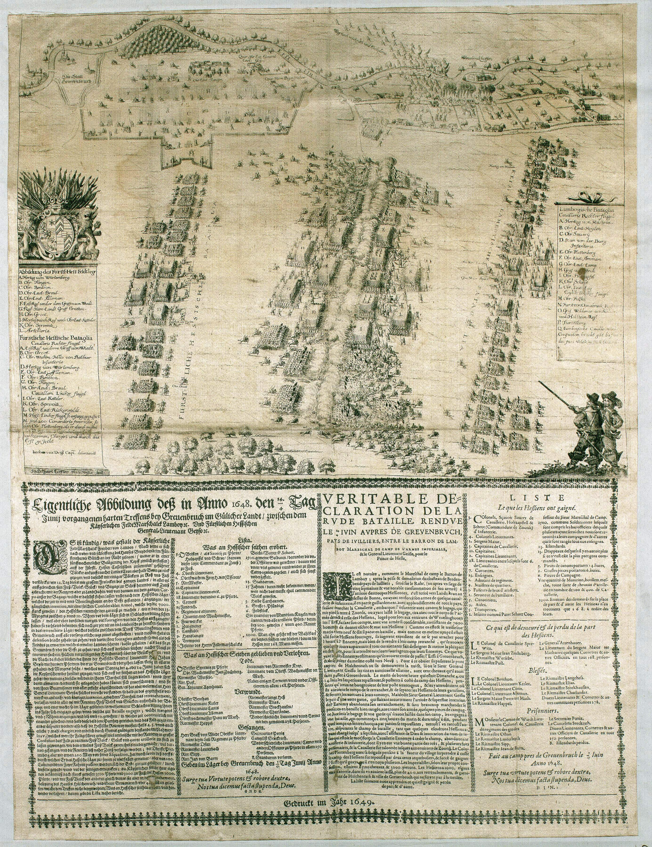 Schlacht bei Wevelinghoven Schlachtverlauf am 5. Juni 1648